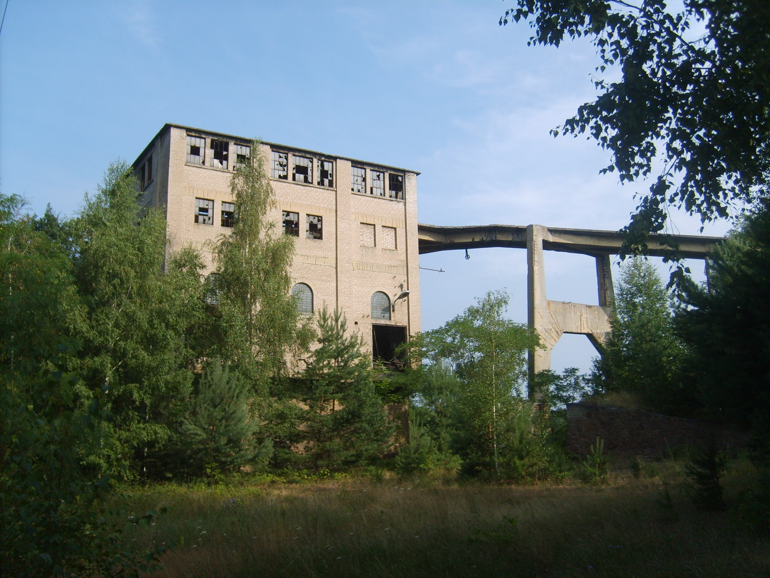 Sortierbunker am Berzitturm in Kahla